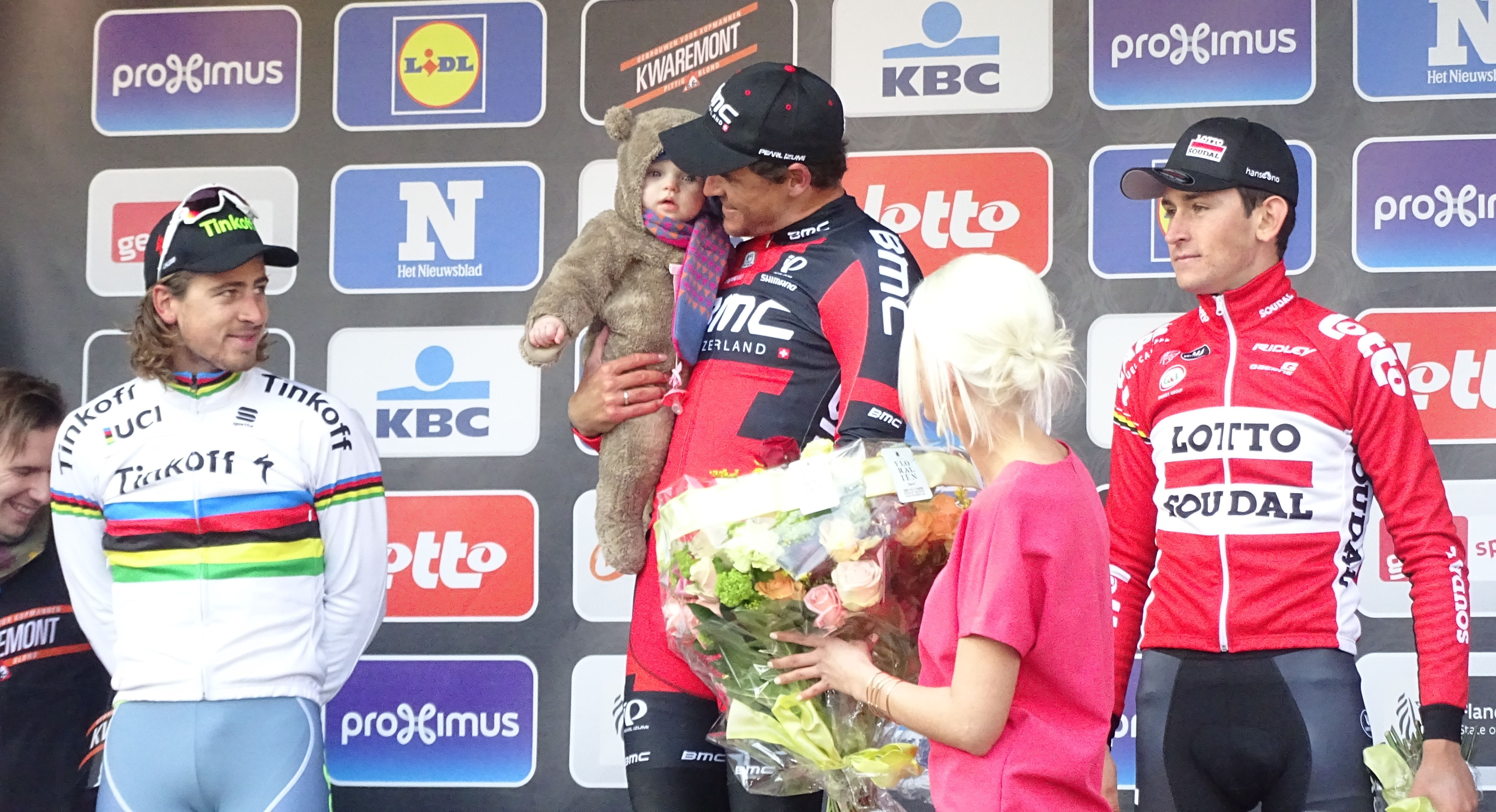 Reportage réalisé le samedi 27 février à l'occasion du départ et de l'arrivée du Circuit Het Nieuwsblad 2016 et de l'arrivée du Circuit Het Nieuwsblad féminin 2016 à Gand, Belgique.